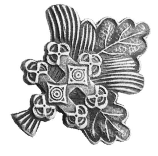 Własna praca Kwz